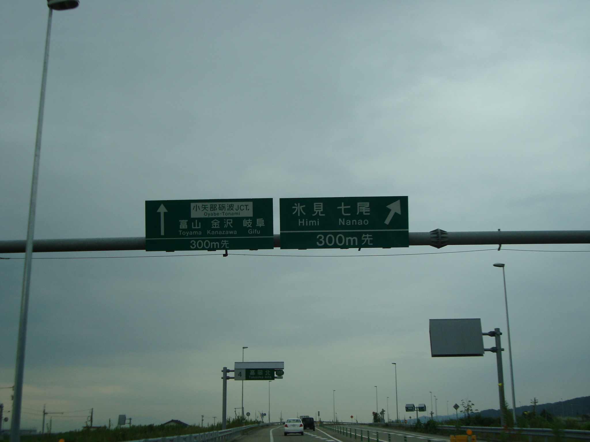 能越自動車道 高岡北インターチェンジ